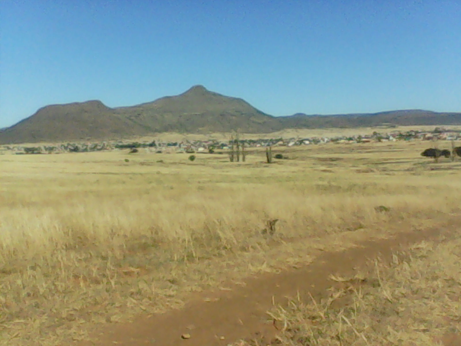 IsiXhosa: Enye yentaba zaseThornhill